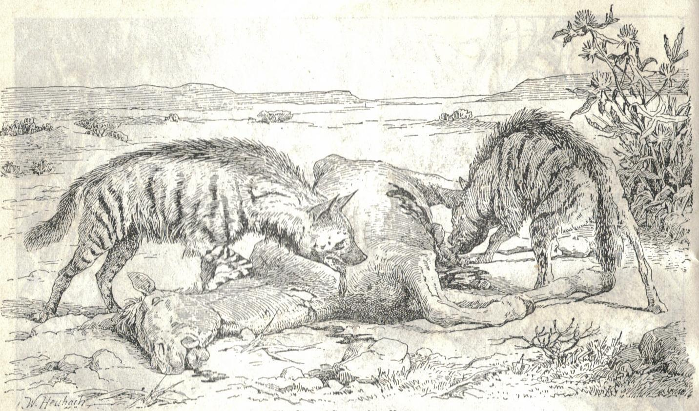 Hyaena hyaena